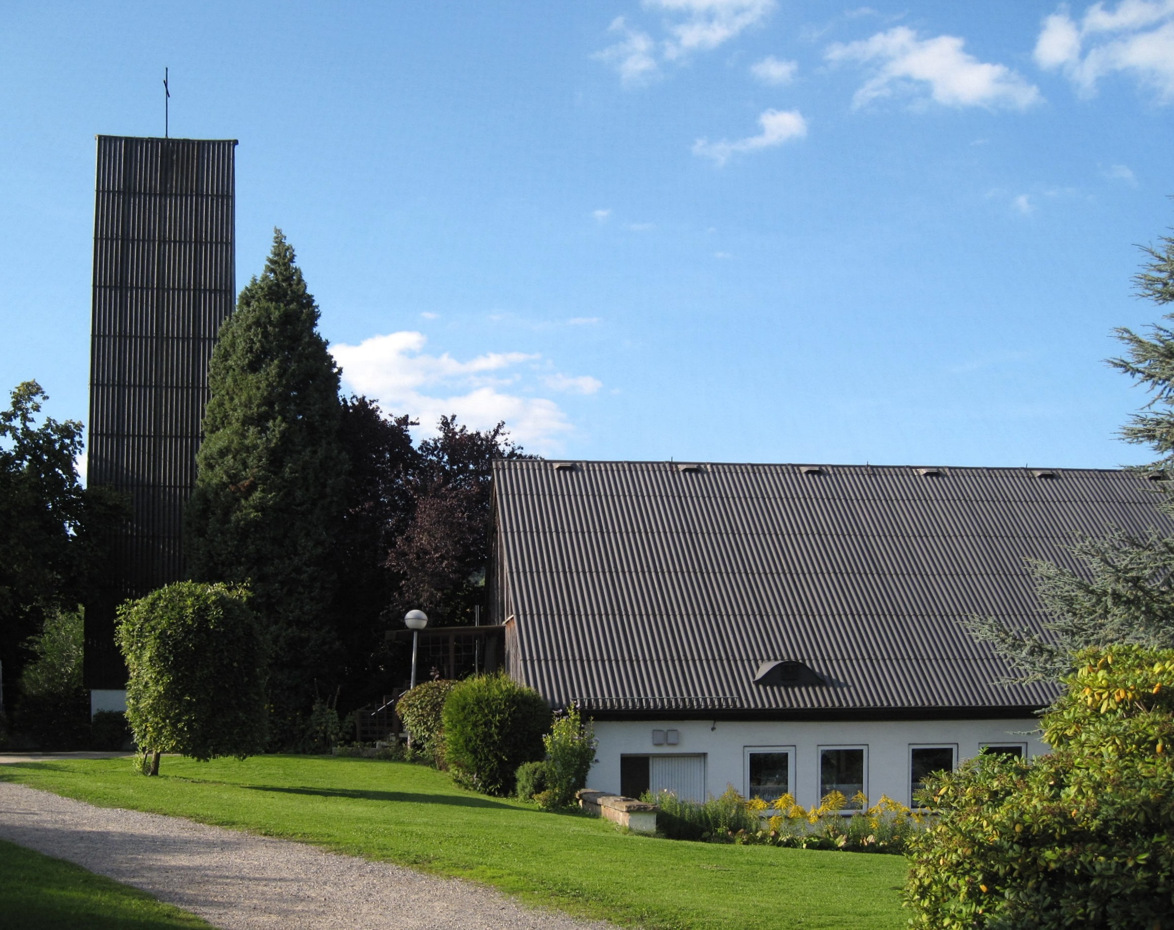 Evangelische Adventskirche in Iserlohn-Dröschede, Rauhe Hardt 1.